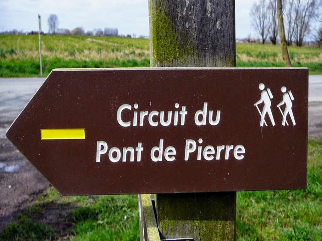 Le Circuit du Pont de PierreSteenwerck Nord.- France.